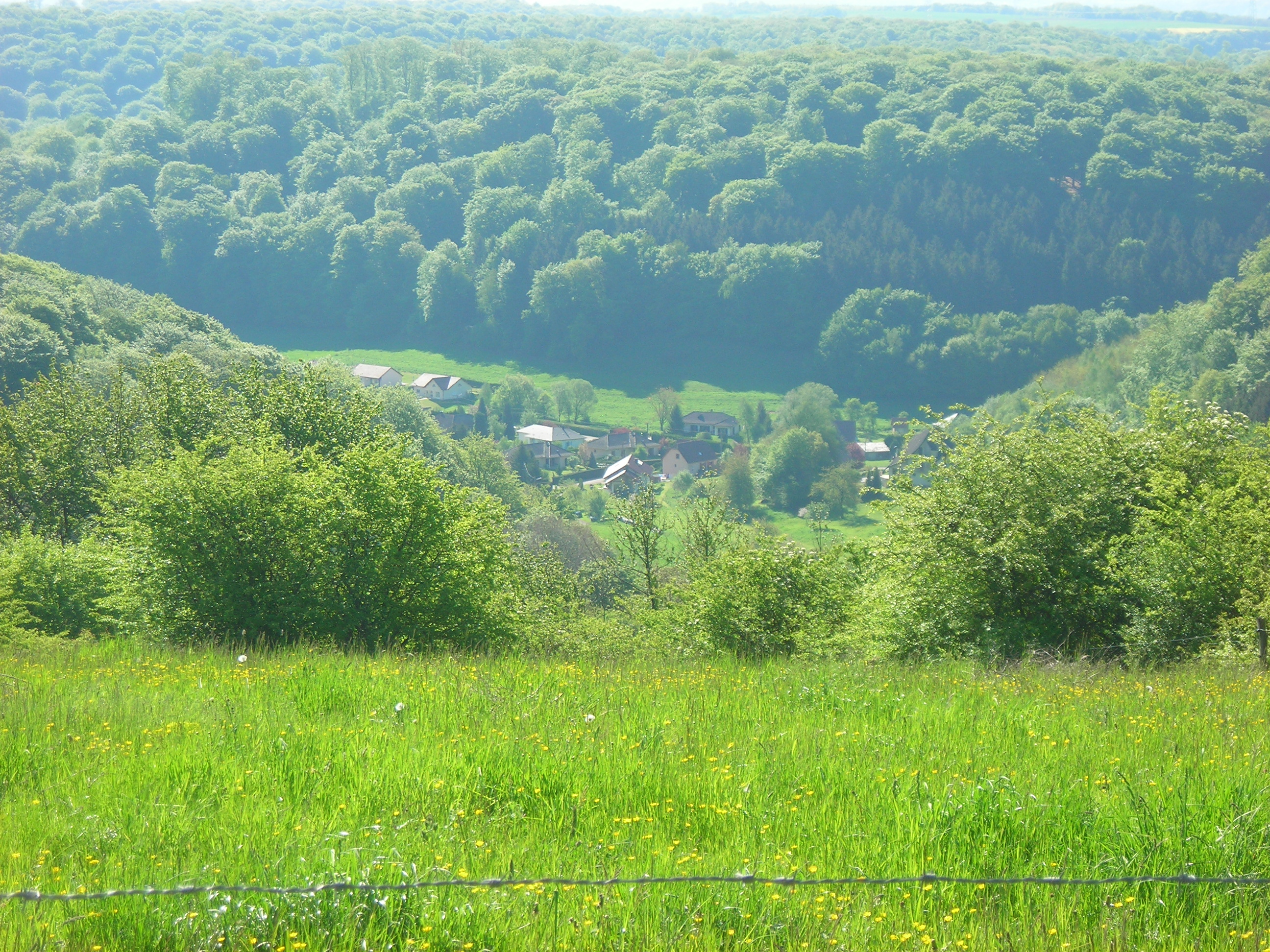 Bisten